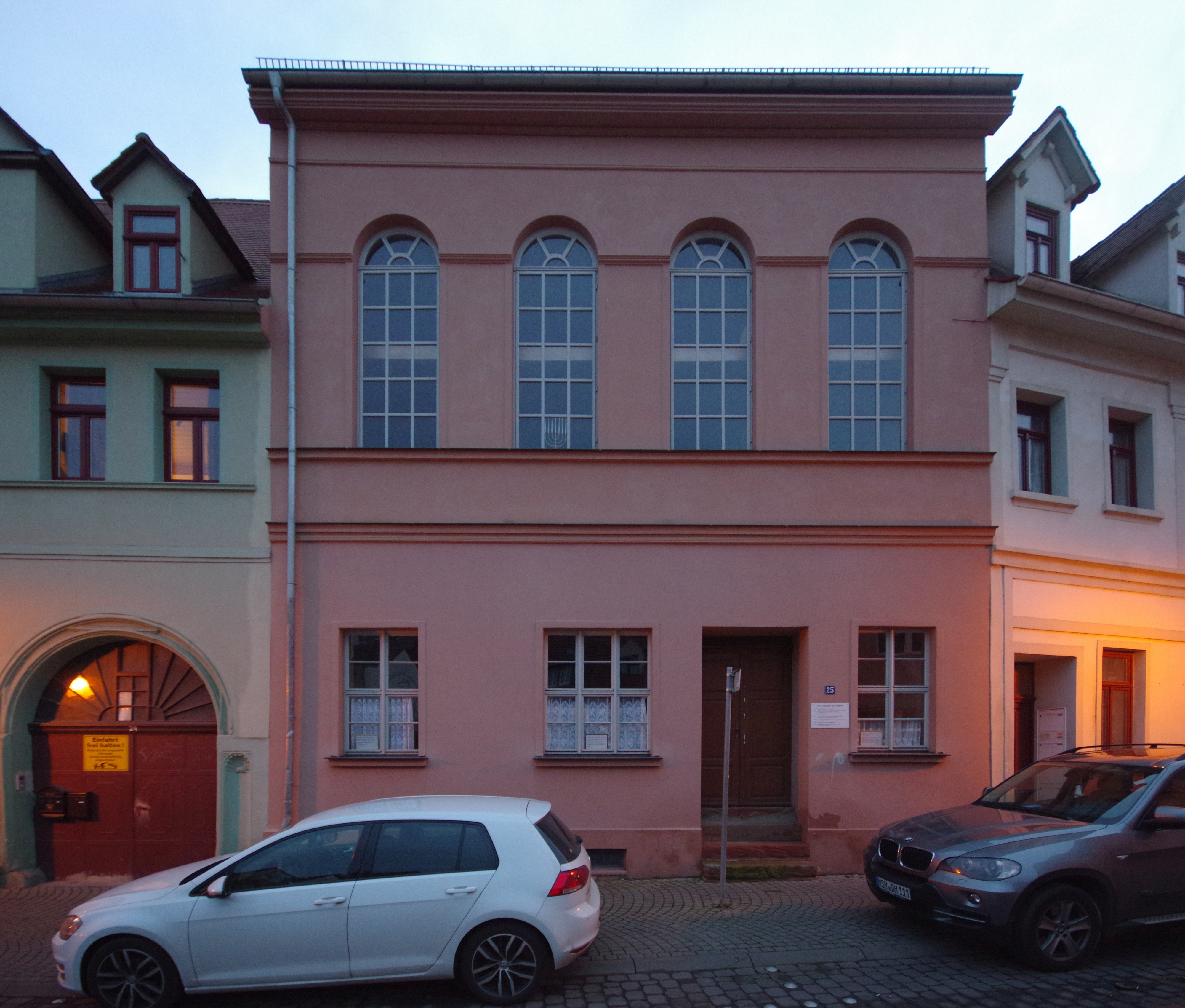 Lutherstadt Eisleben. Das Haus (Adresse befindet sich im Dateinamen) ist denkmalgeschützt.